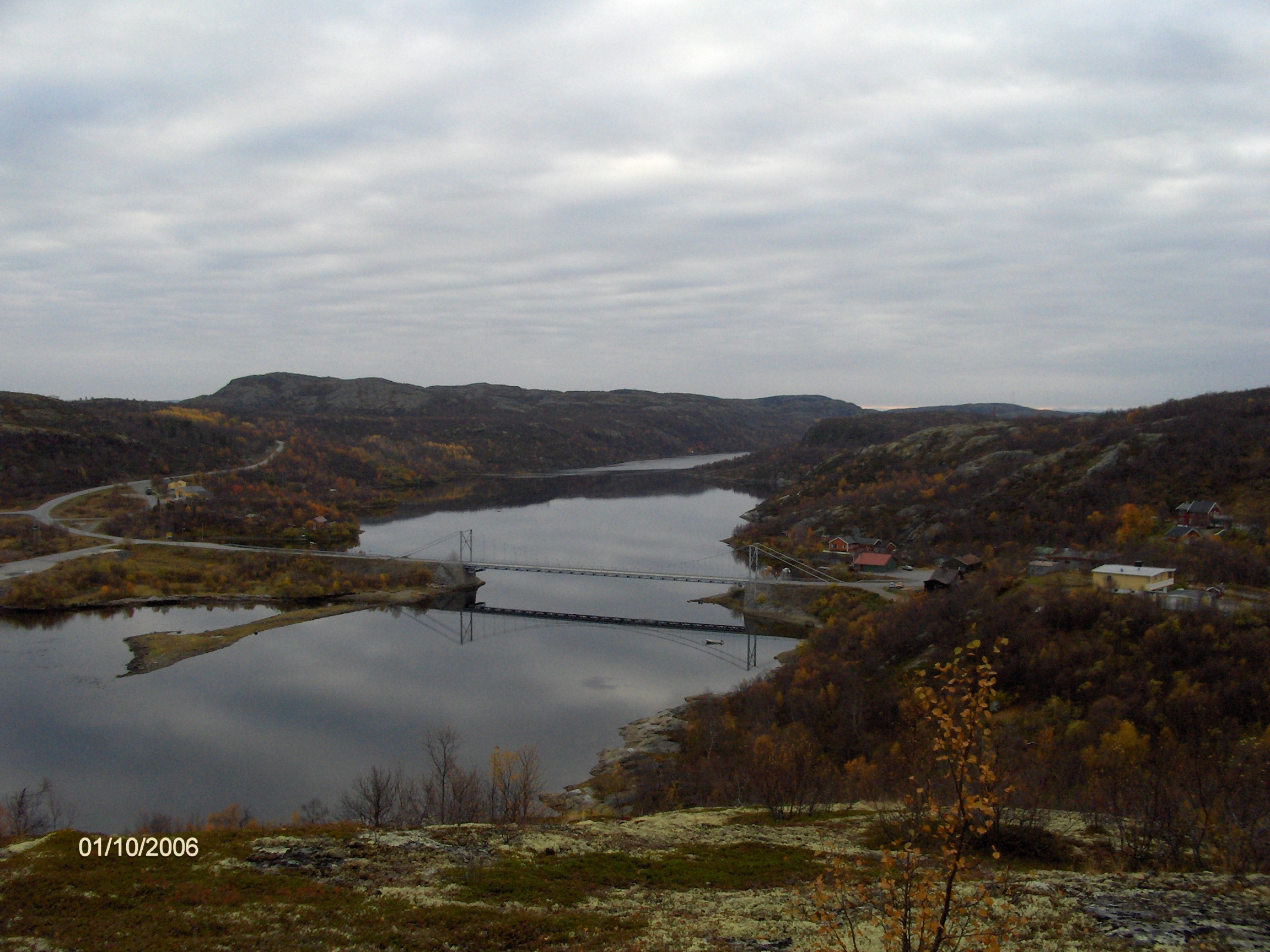 Elvenes, Sør-Varanger, Norway